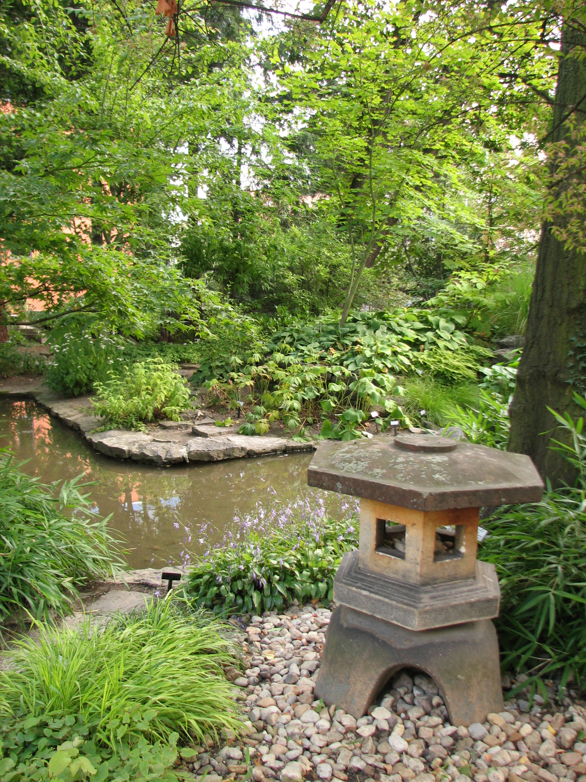 Venkovní expozice - japonská zahrada (Botanická zahrada PřF MU)